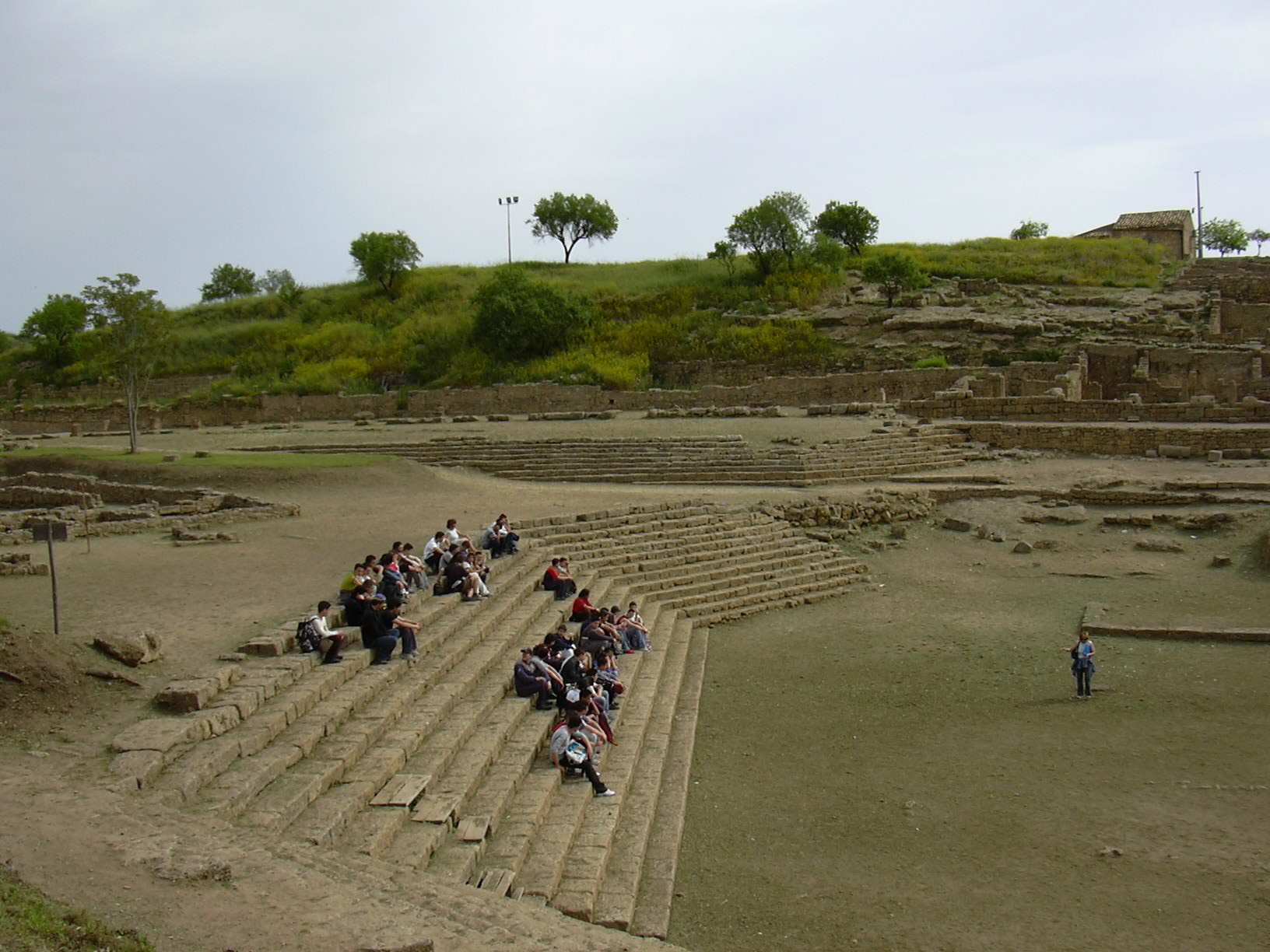 Morgantina - Sicilia: l'Ekklesiasteron, la gradinata trapezoidale usata come teatro e sede dell'assemblea cittadina.